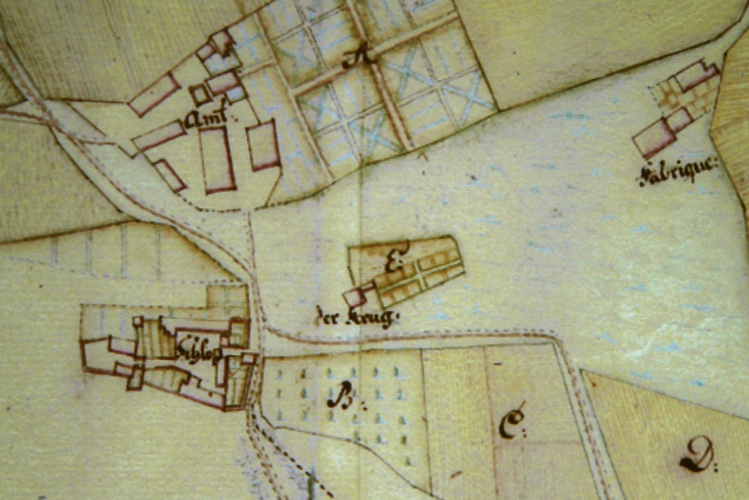 Fürstenberg im 18. Jahrhundert